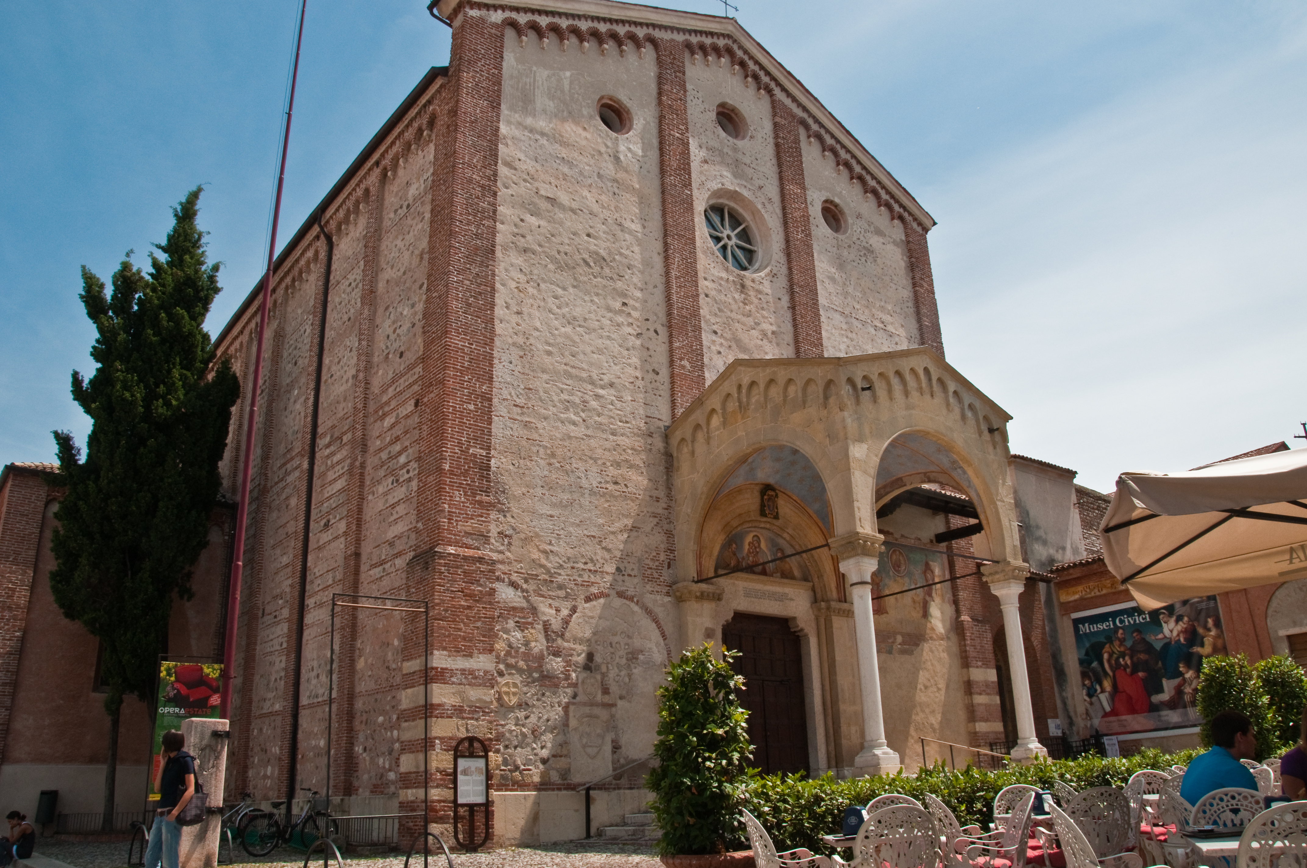 2009-July-10-Bassano del Grappa-4